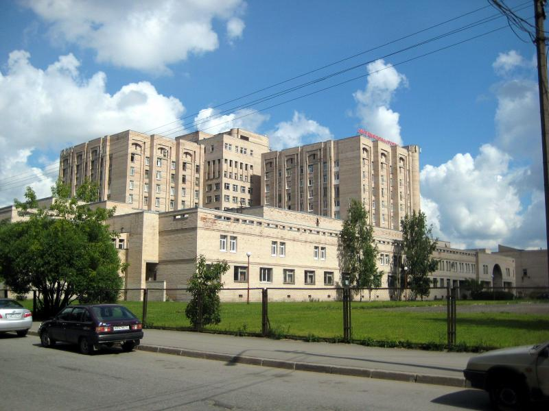 НИИ Вредена